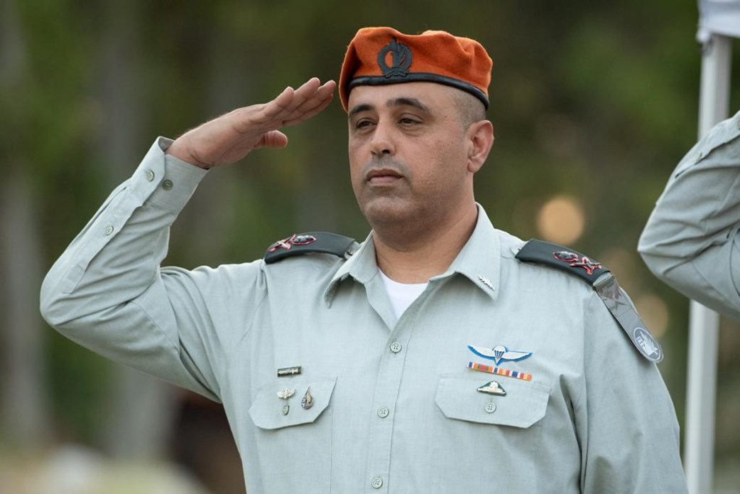 מפקד פיקוד העורף היוצא , האלוף תמיר ידעי